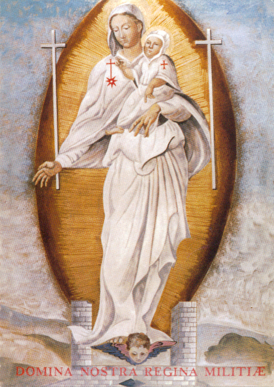 Das Fresko „Domina nostra Regina Militiae“ stammt aus dem Mittelalter und befindet sich in der Kirche ‚La Magione’, einer ehemaligen Komturei des Templerordens (heute im Besitz des Malteserordens), in Siena.